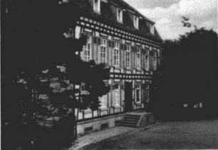 Reifensteiner Schule Opleiden